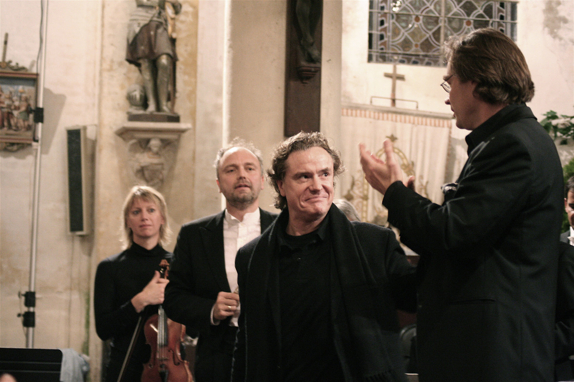 Dominique Probst (au centre), avec le chef d'orchestre Olivier Holt, créateur de l'opéra Maximilien Kolbe